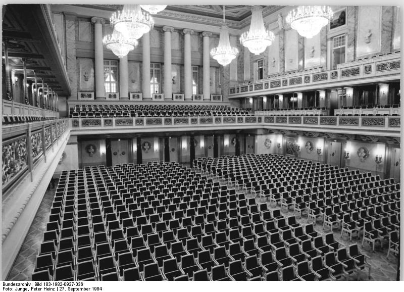 Berlin, Schauspielhaus, Zuschauerraum ADN-ZB Junge 29.9.84-zeil- Berlin: Schauspielhaus, Bildserie zur Wiedereröffnung als Konzerthaus am Vorabend des 35. Jahrestages- Dominierend in dem neuen Konzerthaus, ist der große Saal im 2. Geschoß. Er nimmt eine Grundfläche von 45 mal 22 m ein und hat eine Höhe von 17,50 m. Dem Publikum stehen maximal 1650 Plätze, davon 820 Plätze im Parkett und 830 auf den beiden Rängen zur Verfügung. Die Rückseite schmücken 6 ionische Säulen, 14 große Kronleuchter mit Kristallen lassen den Saal in strahlenden Glanz erscheinen. Sperrfrist: Dienstag, 2.10.84 4.00 Uhr.